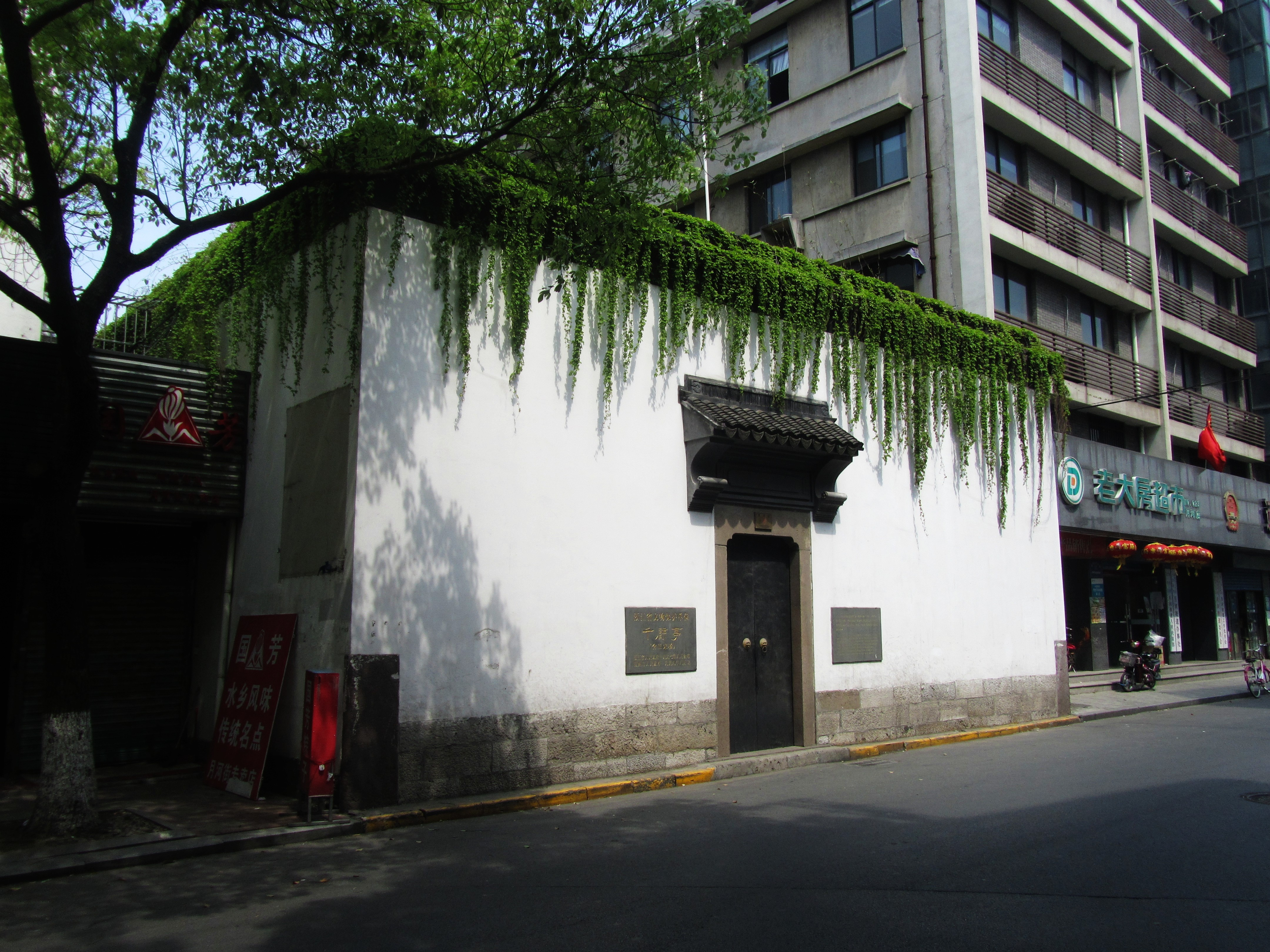 湖州千甓亭，南面。